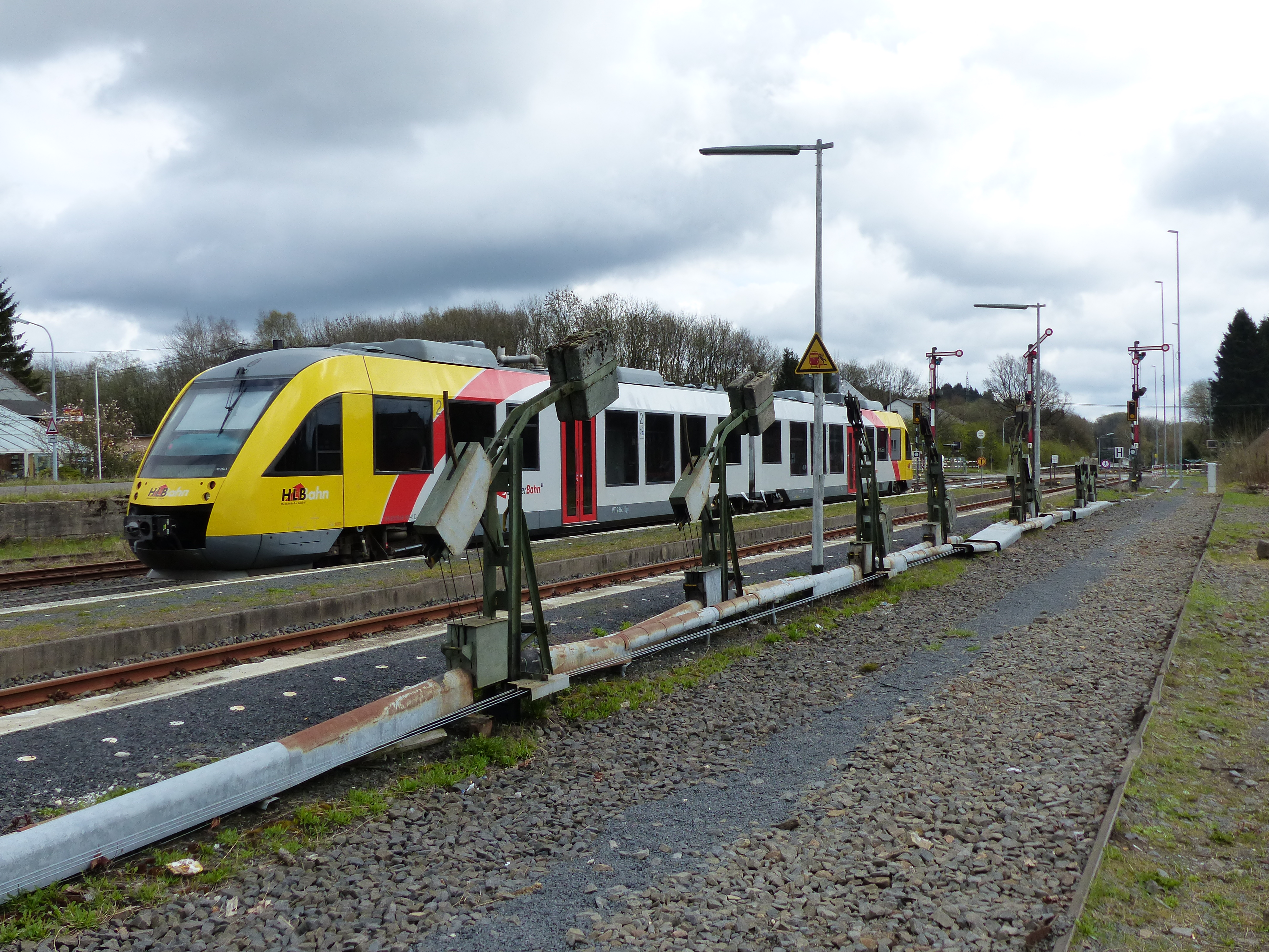 Aus dem Bahnhof Langenhahn in Richtung Westerburg ausfahrender HLB-Triebwagen